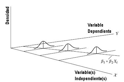 Distribucion de los errores no sistematica. Homocedasticidad.